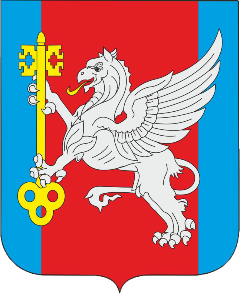 Герб муниципального образования Красноперекопский район Республики Крым